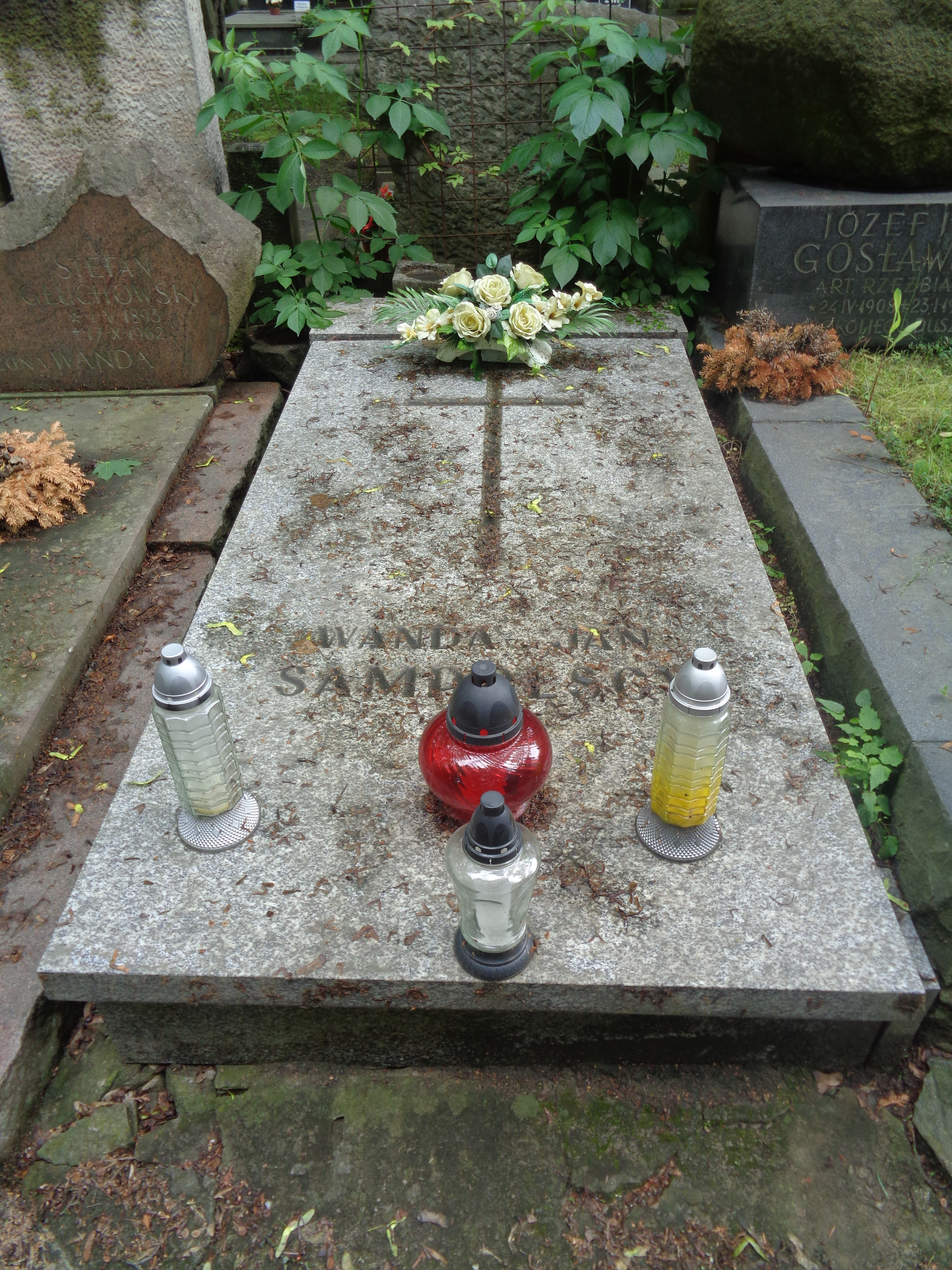 Grób Wandy Sampolskiej na Cmentarzu Powązkowskim